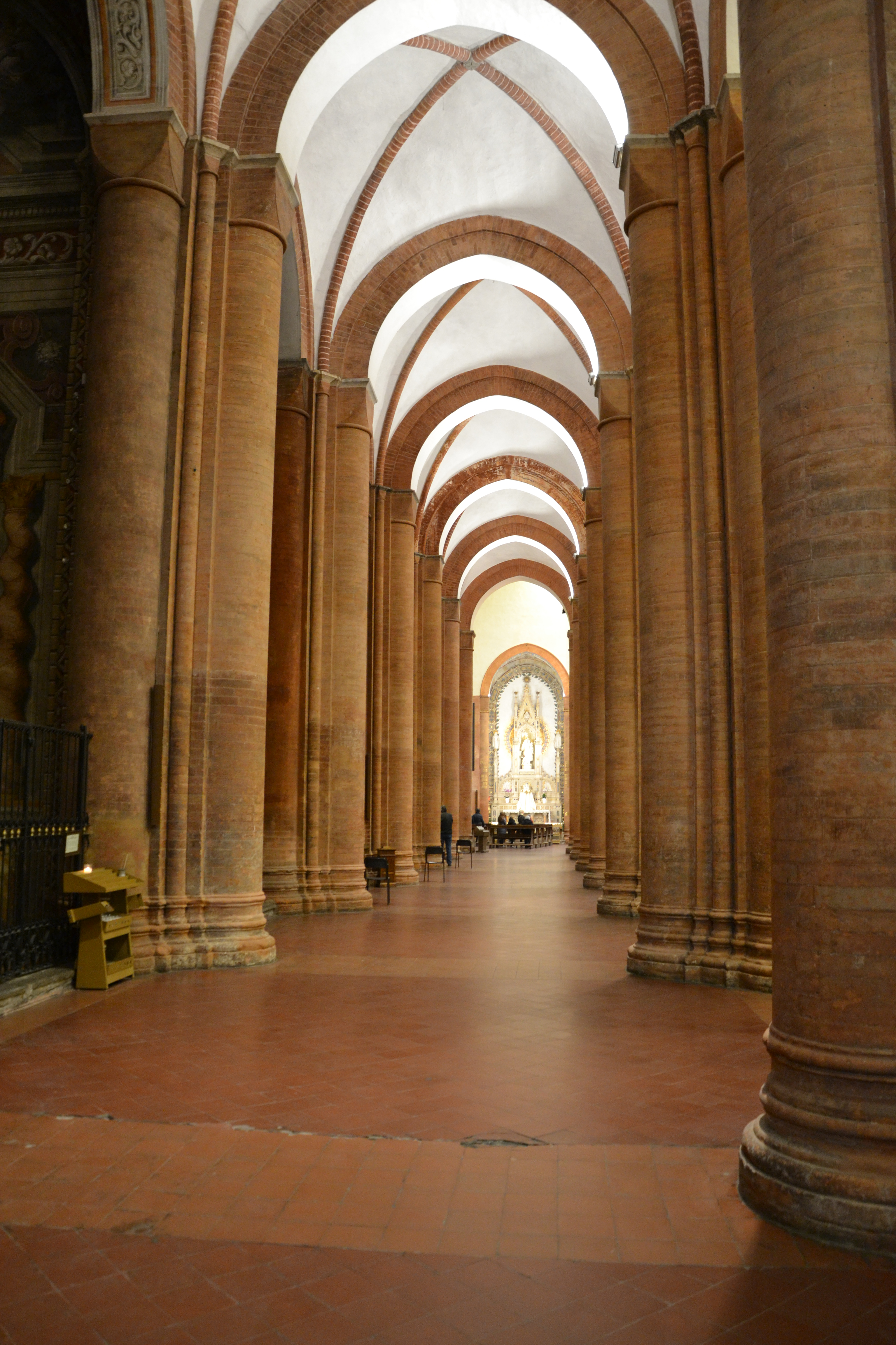 Chiesa di Santa Maria del Carmine (Pavia)